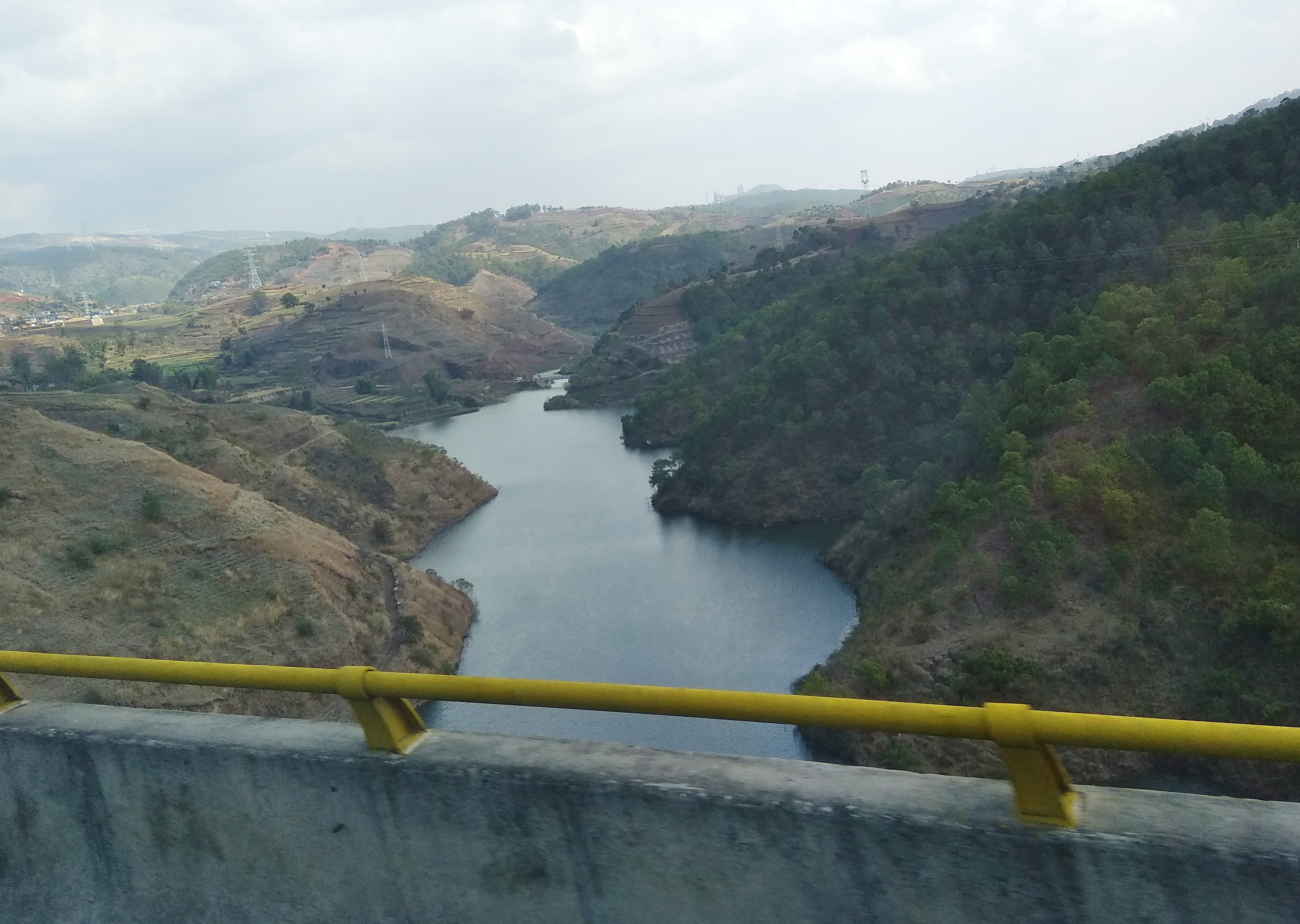 位于中国云南省保山市隆阳区小干岩附近的蒲缥河河段，拍摄于杭瑞高速蒲缥大桥，面朝南。